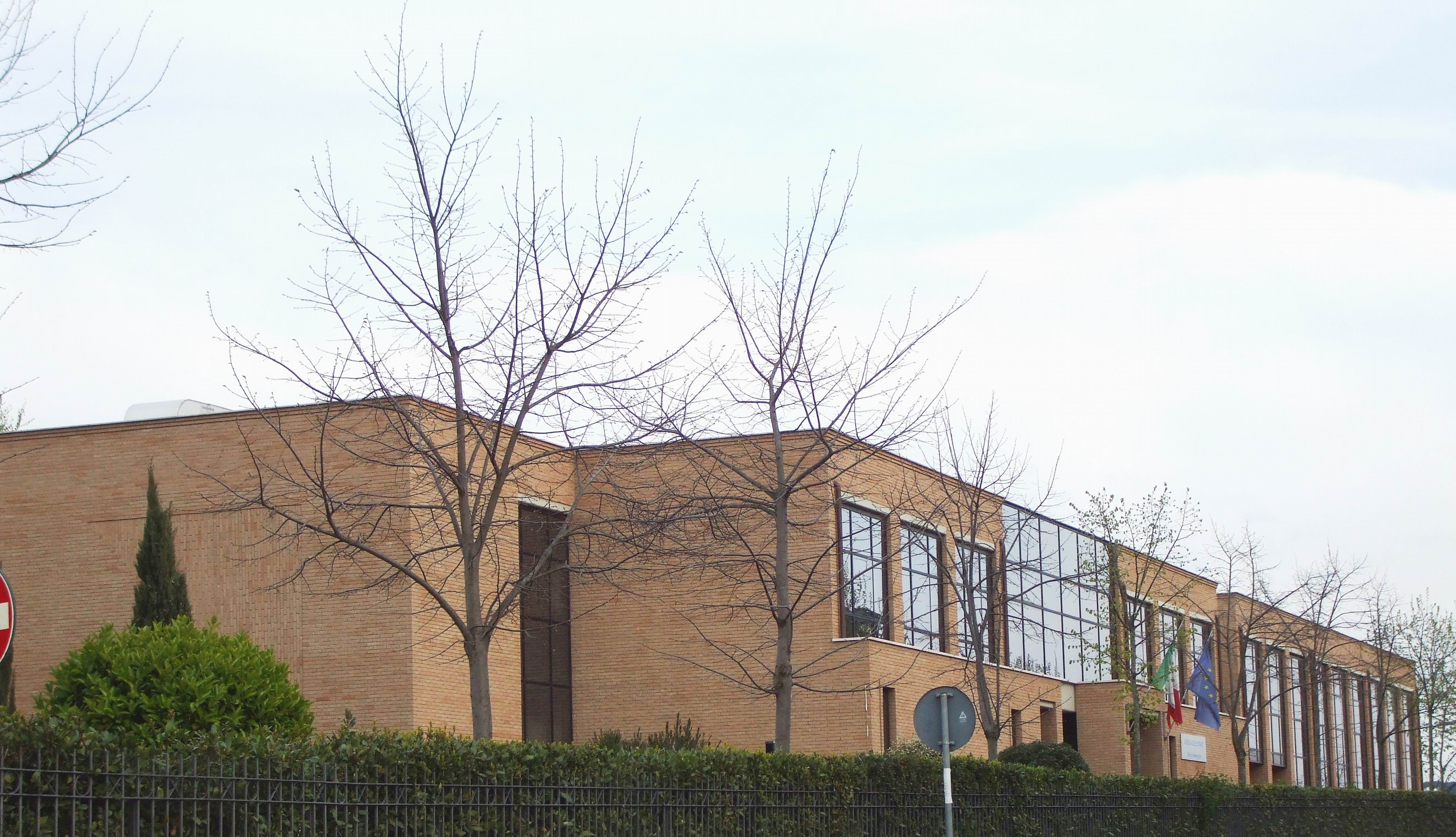 Albano Laziale - Ufficio Tributi